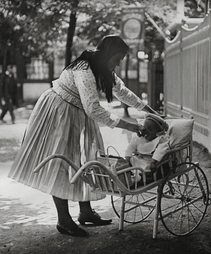 Tschechische Kinderfrau mit Kinderwagen in Wien